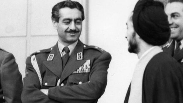 سید مجتبی نواب صفوی (سيد مجتبی میرلوحی) در هنگام دستگیری به دست تیمور بختیار در سال 1334